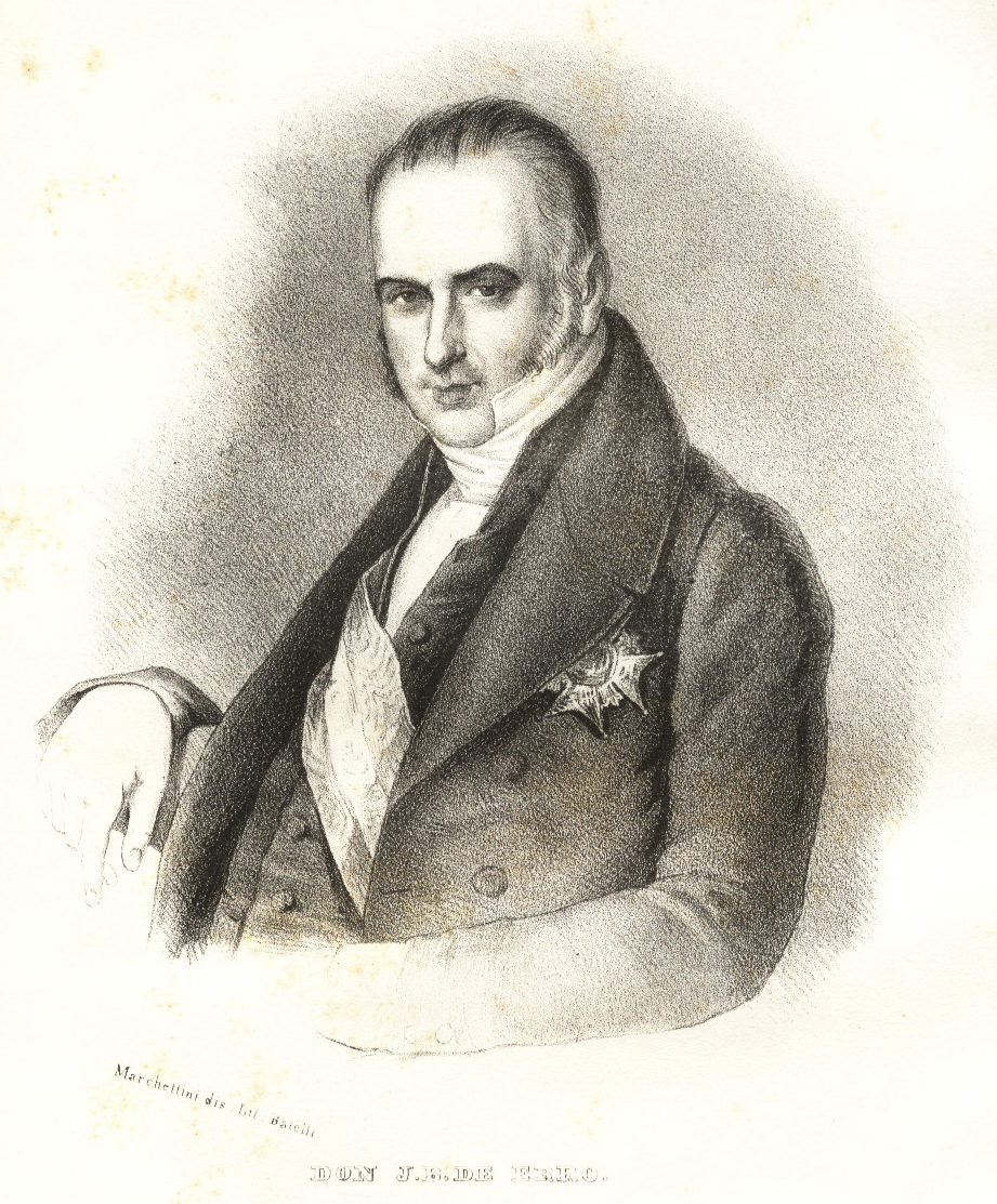 Juan Bautista de Erro. Dibujo de Isidoro Magués. "Don Carlos e i suoi difensori". Firenze 1837